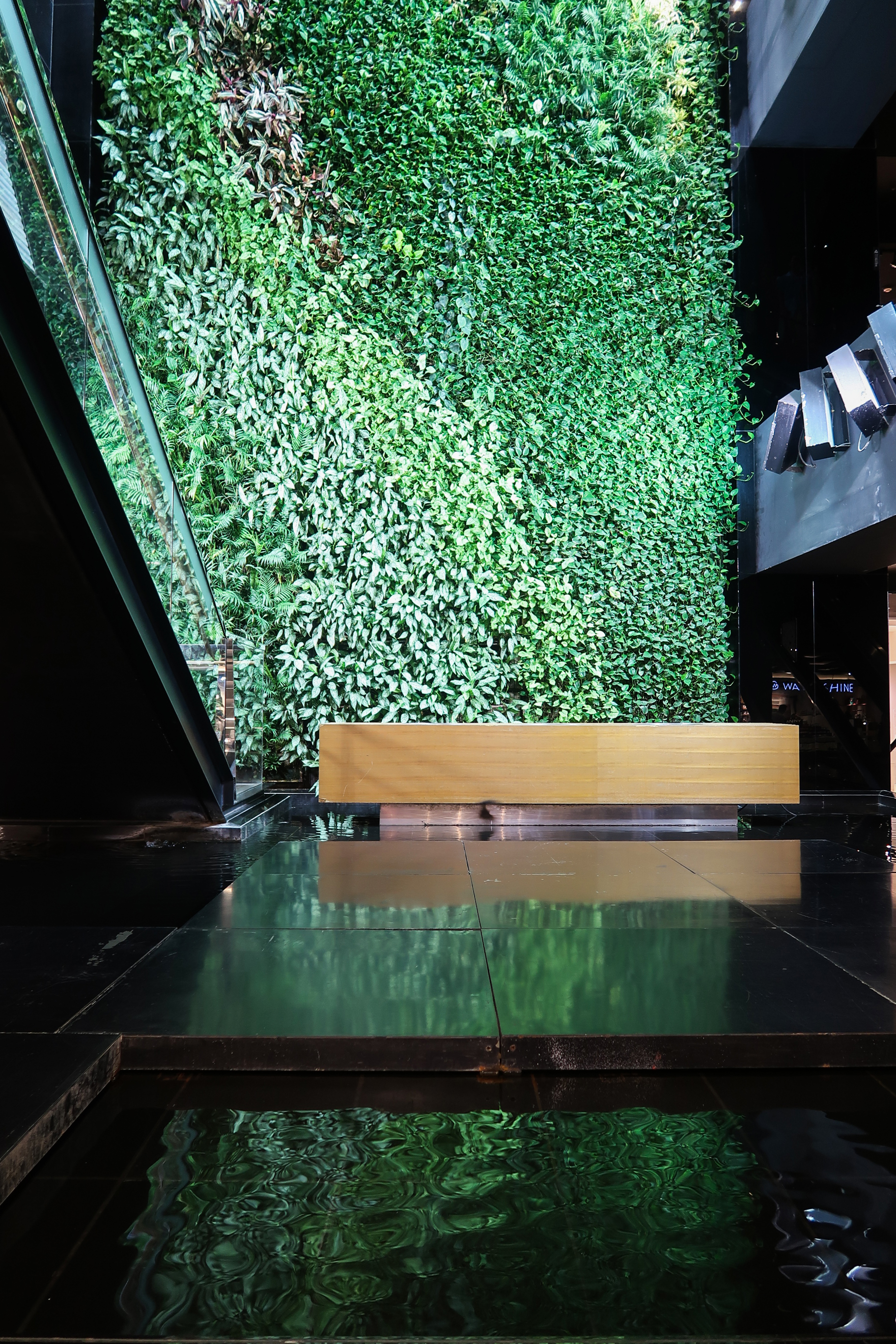 勤美 誠品綠園道